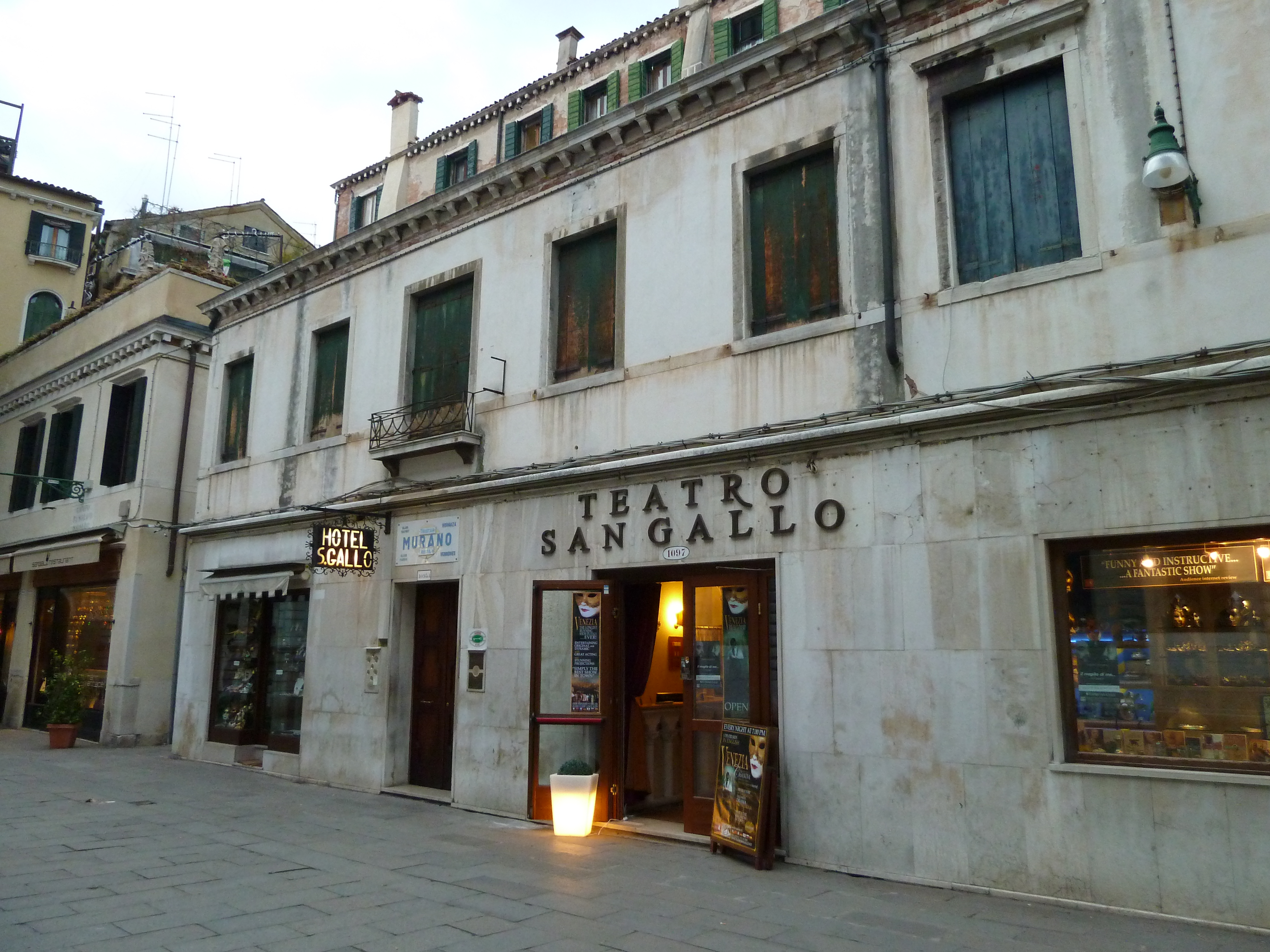 Teatro san gallo